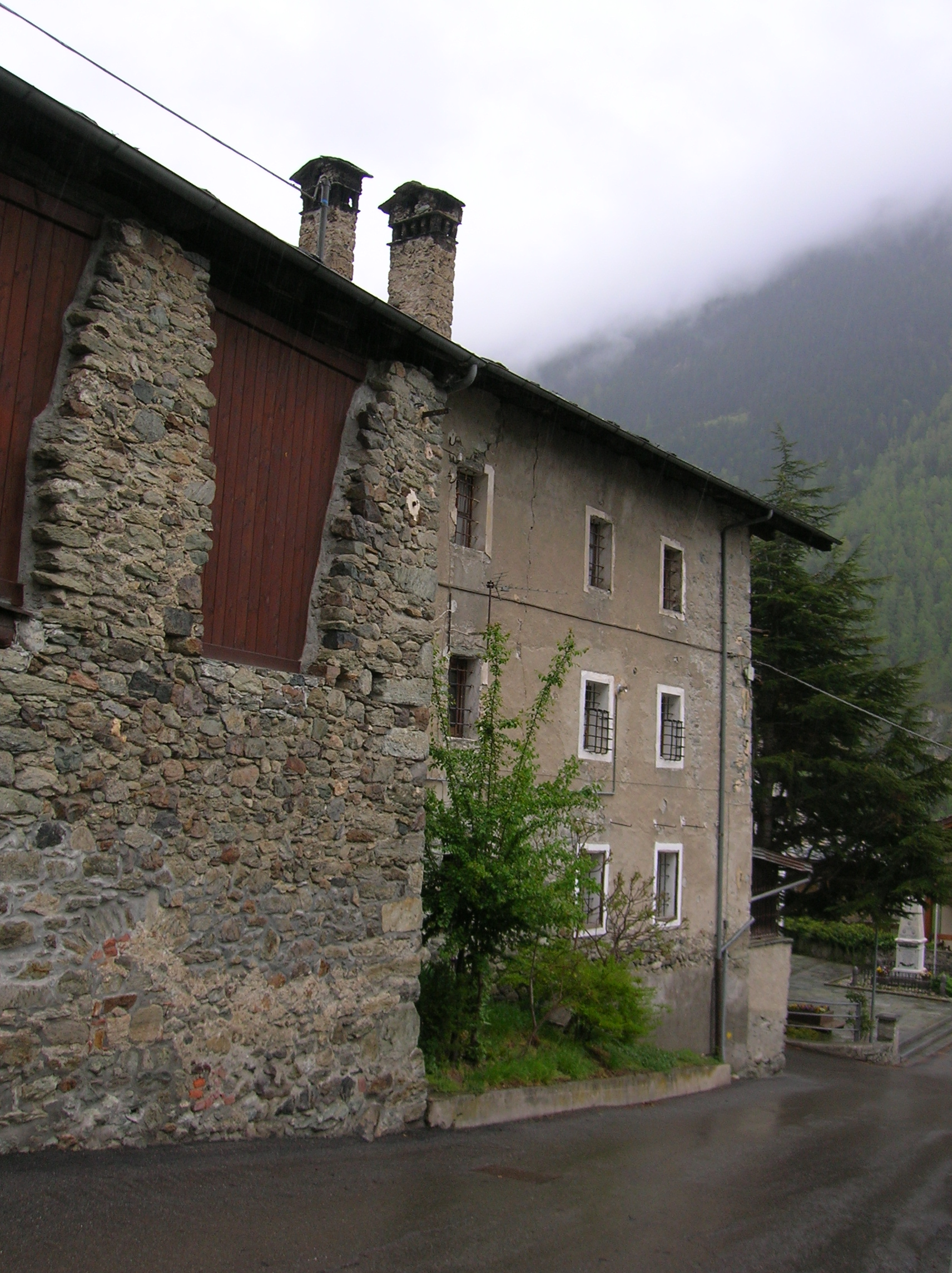 Lato della casaforte La Tour, Valpelline, Valle d'Aosta, Italia.